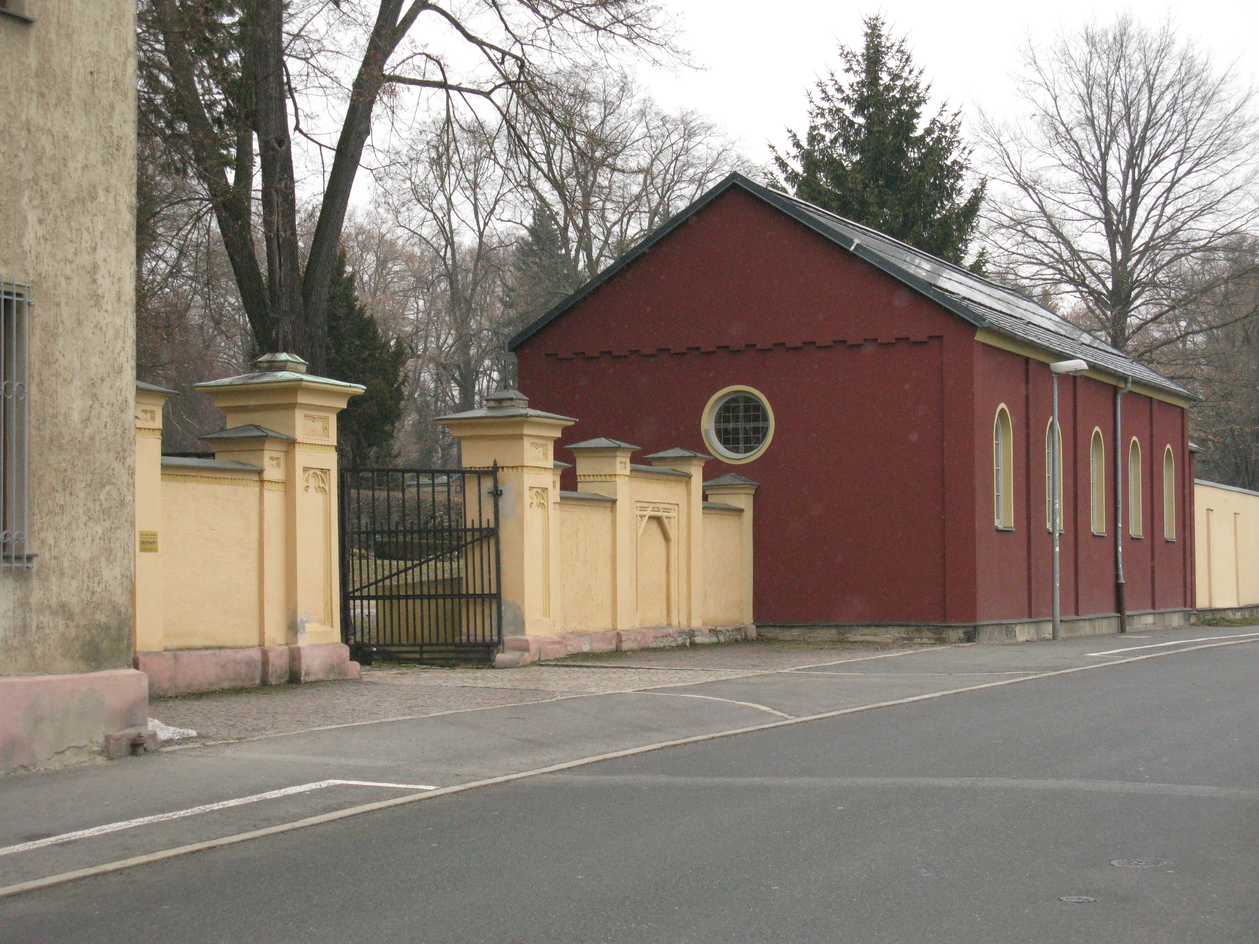 Plauen, Friedhofskapelle und Eingangsbereich des Friedhof I (Reißiger Straße 57). Der Friedhof ist ein Flächendenkmal mit über 40 Einzeldenkmalen.